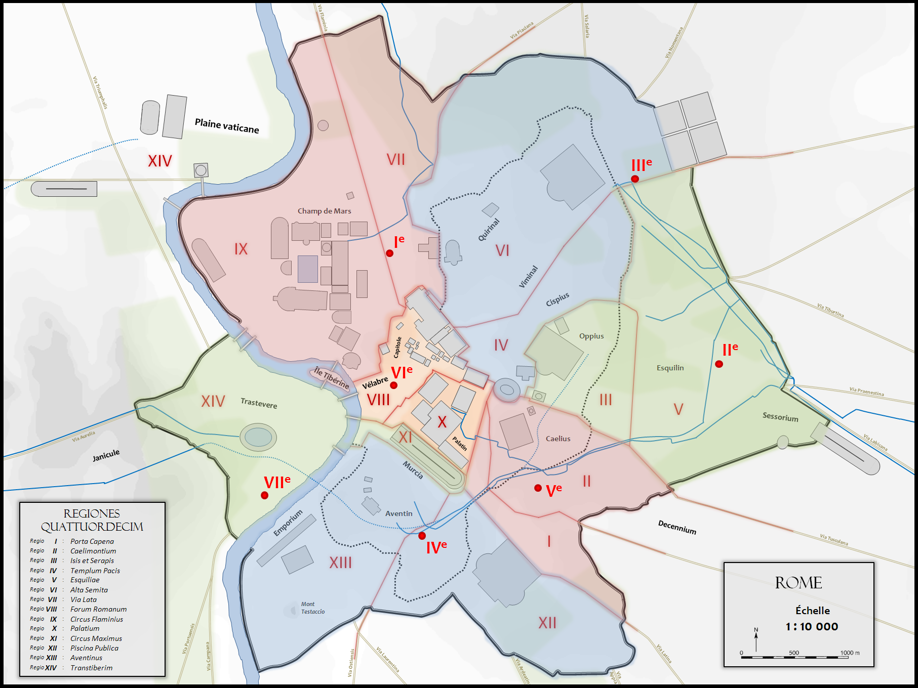 Plan de Rome redessiné à partir de diverses sources. Tous les bâtiments importants construits jusqu'à la fin de l'Empire romain sont dessinés, ainsi que les régions d'Auguste et les collines de Rome. Auteur : ColdEel En rouge, les sept casernes de vigiles et leurs aires d'influence